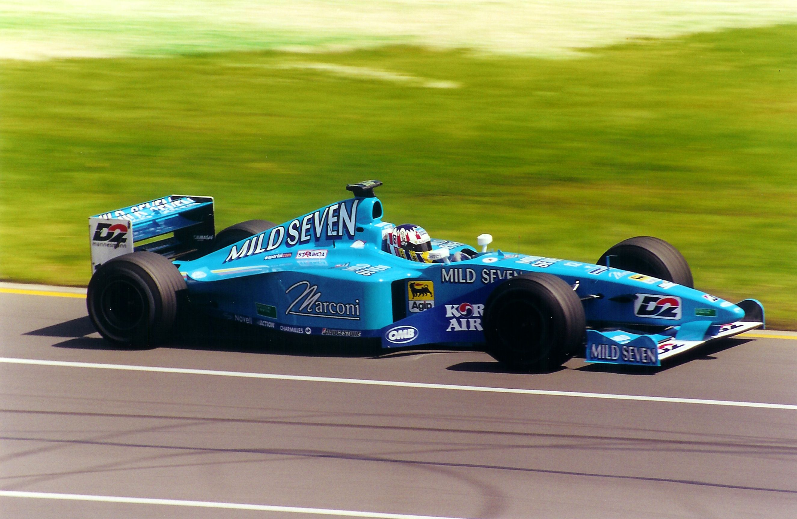 Gran premio di Australia Benetton 2000